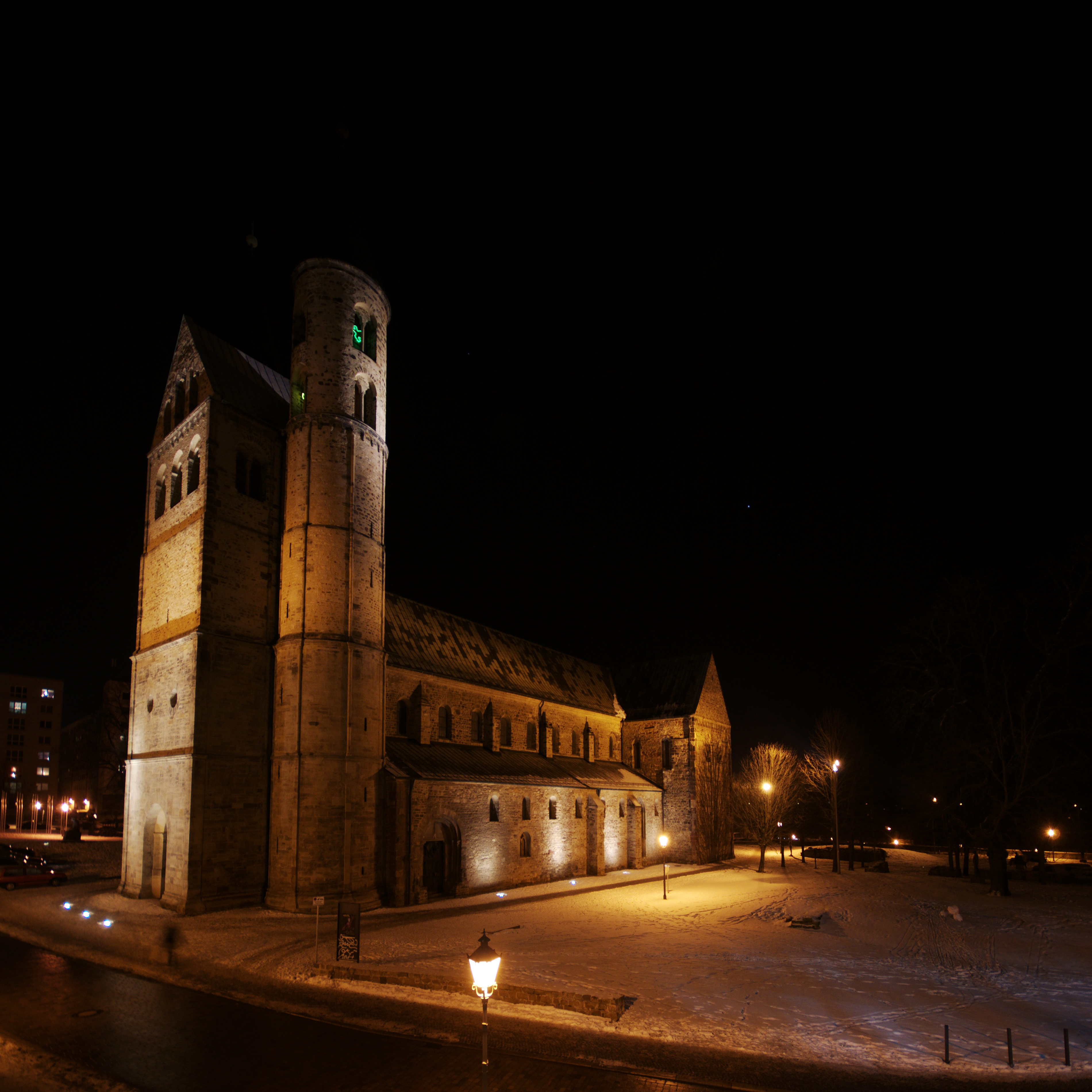 Kloster Unser Lieben Frauen, Magdeburg